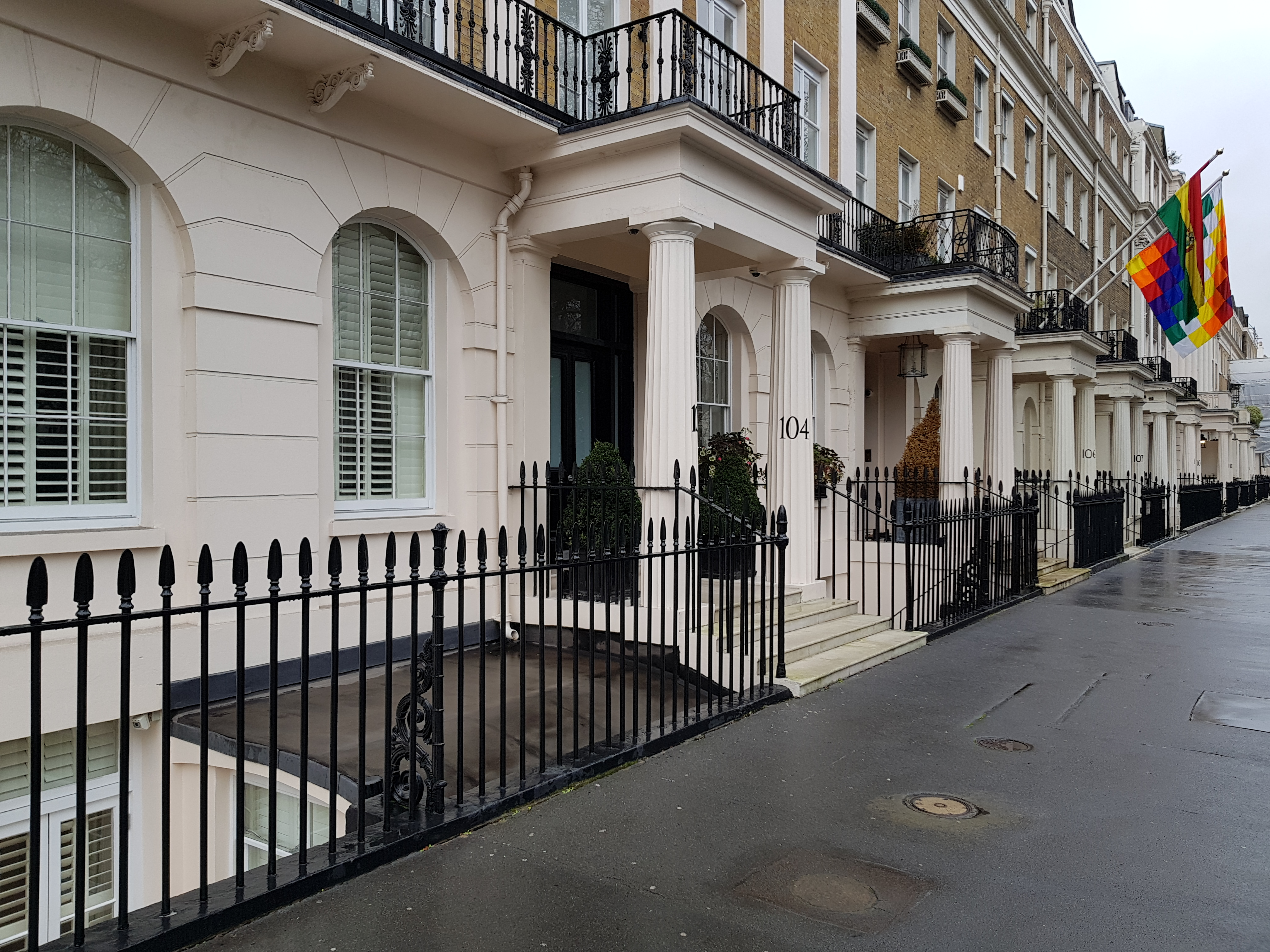 Eaton square, Londres.